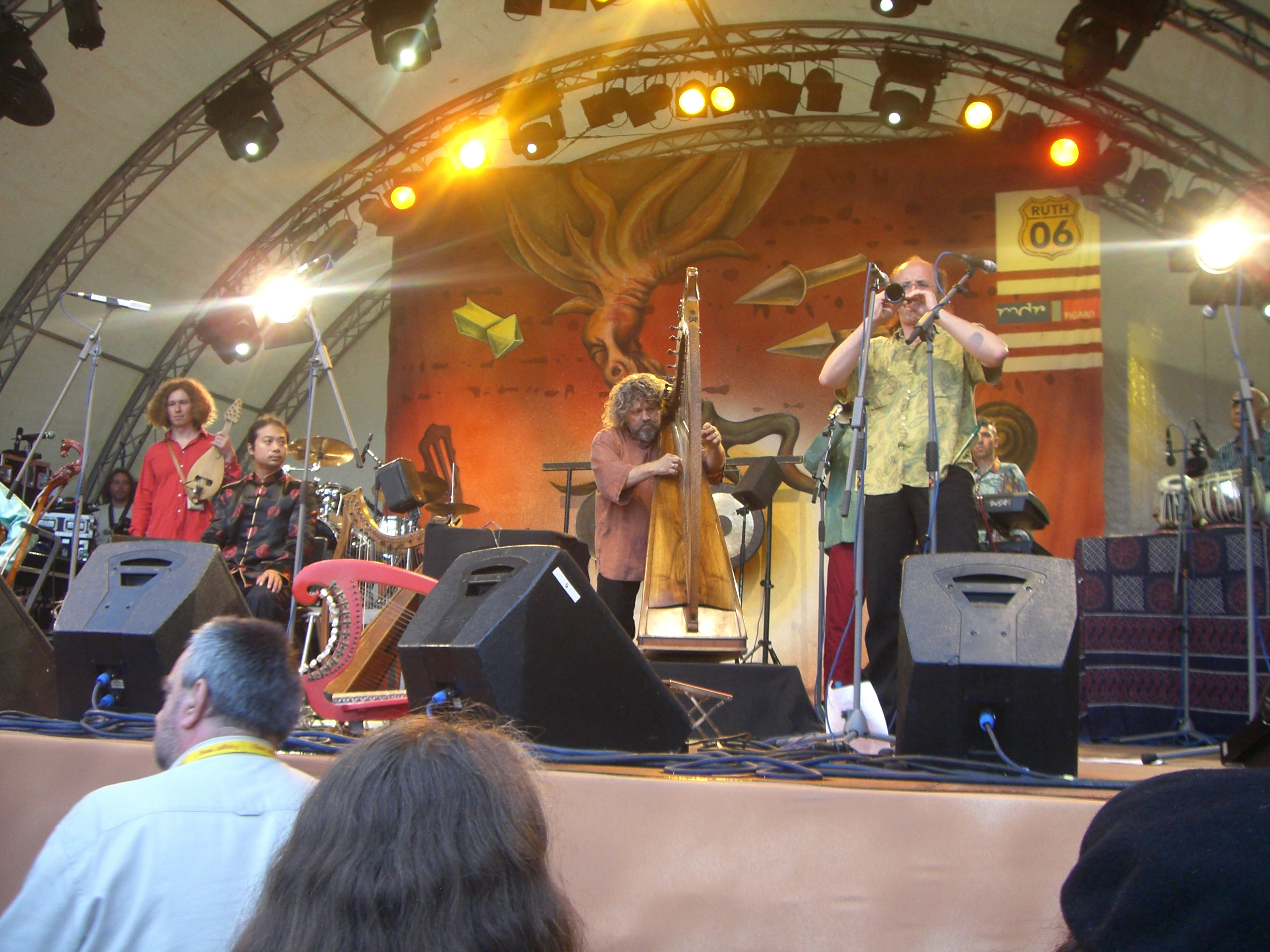 Rüdiger Oppermann und das Projekt Karawane beim TFF Rudolstadt 2006. Musiker (erste Reihe) - von Links nach Rechts: Dimitar Gougov -Bulgarische Gadulka Wu Wei Rüdiger Oppermann - Keltische Harfen, e-harp, Konzeption Bijan Mahjub - Bombarde, Whistle